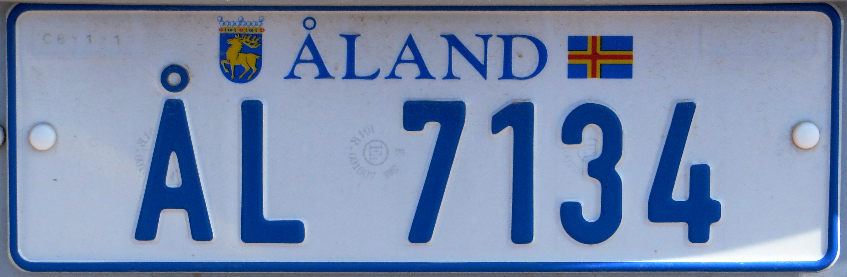 Åland kentekenplaat